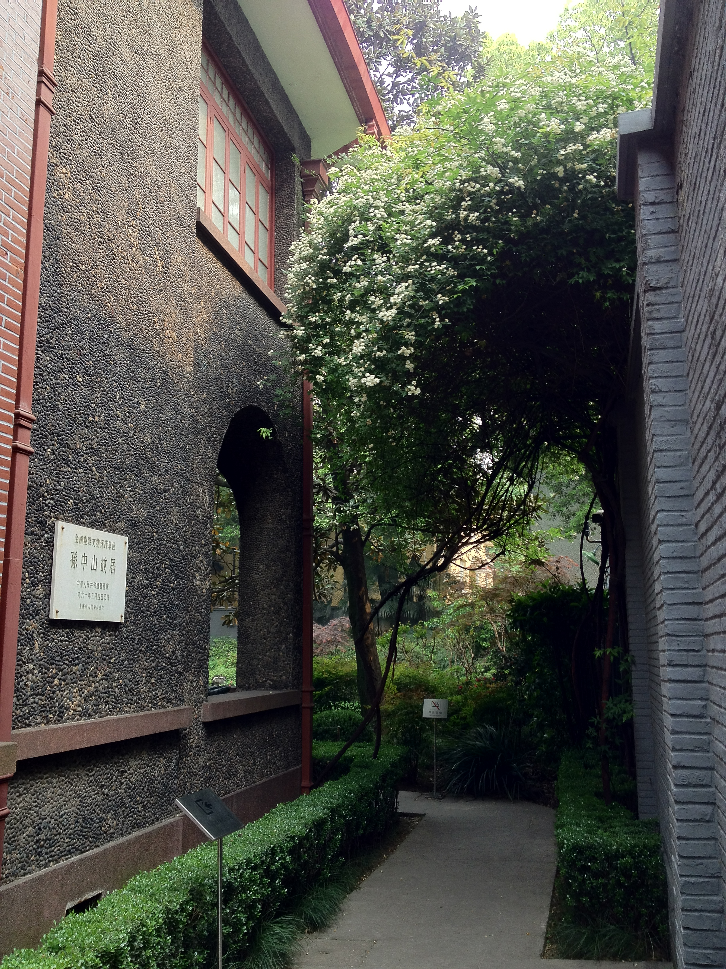 中文（中国大陆）: 上海思南路孙中山故居侧面走廊